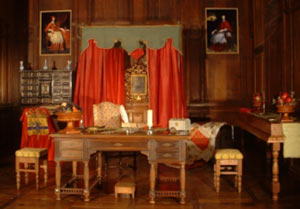 Chambre du Château de Condé où séjourna le Cardinal de Richelieu